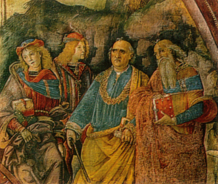 Appartamento borgia, sala delle arti liberali